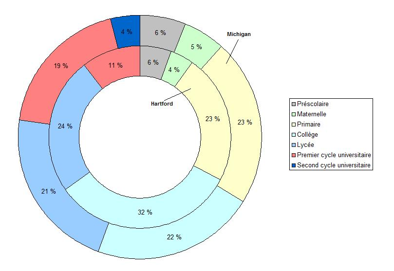 Répartition, selon le niveau de la population scolaire, à Hartford (Michigan) et dans l'Etat du Michigan (Etats-Unis).